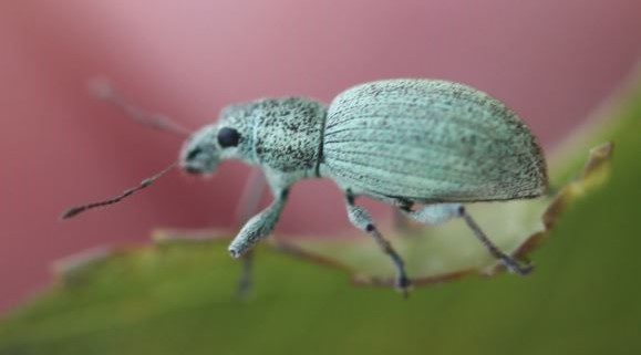 Rüsselkäfer Eusomus ovulum am 12. Mai 2019 in Walldorf/Baden